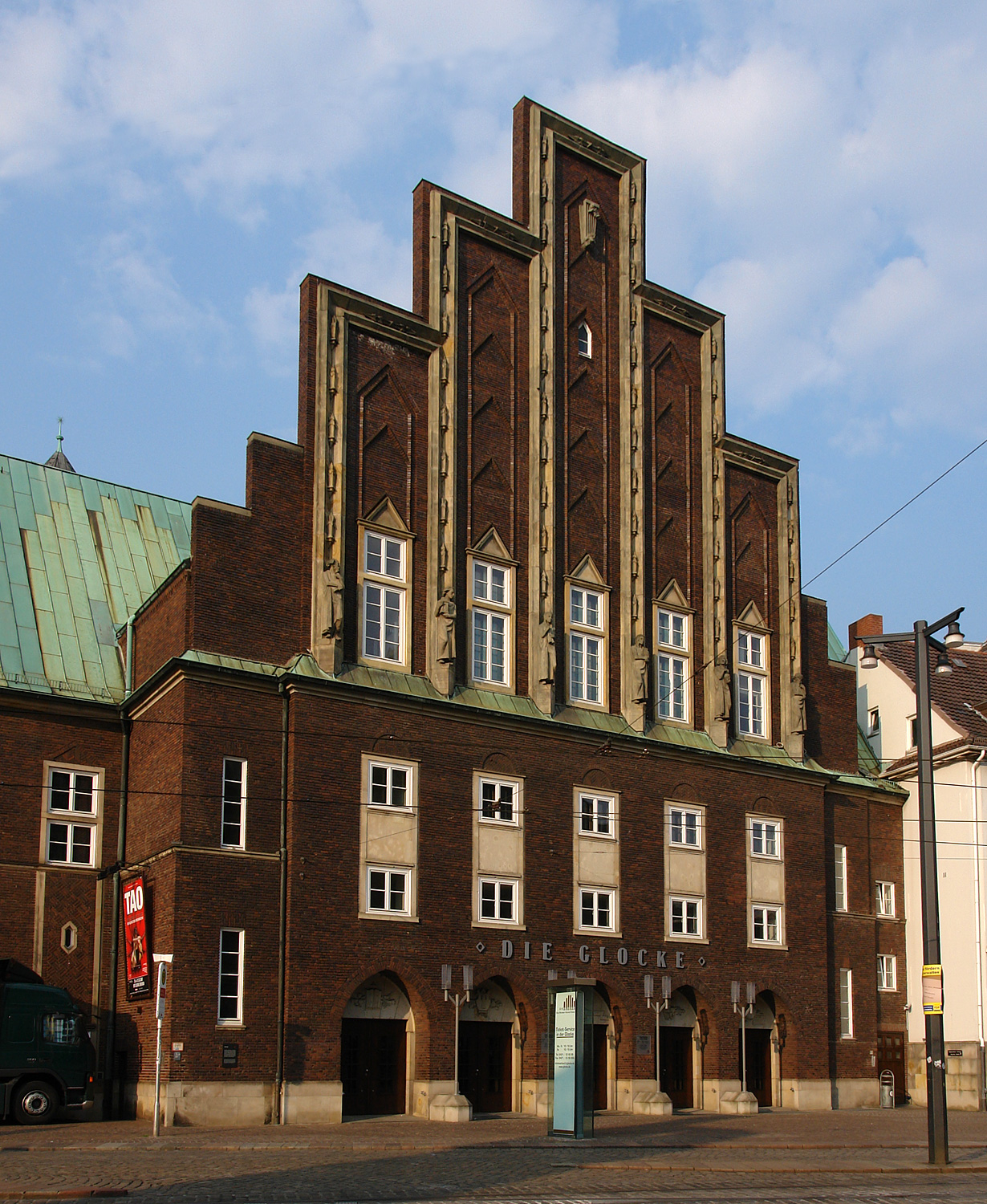 Konzerthaus „Die Glocke“ in Bremen Das abgebildete Objekt ist ein geschütztes Kulturdenkmal in der Freien Hansestadt Bremen, mit der Nr. 0179,T beim Landesamt für Denkmalpflege registriert.